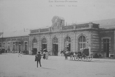 La gare de Tarbes au début des années 1900